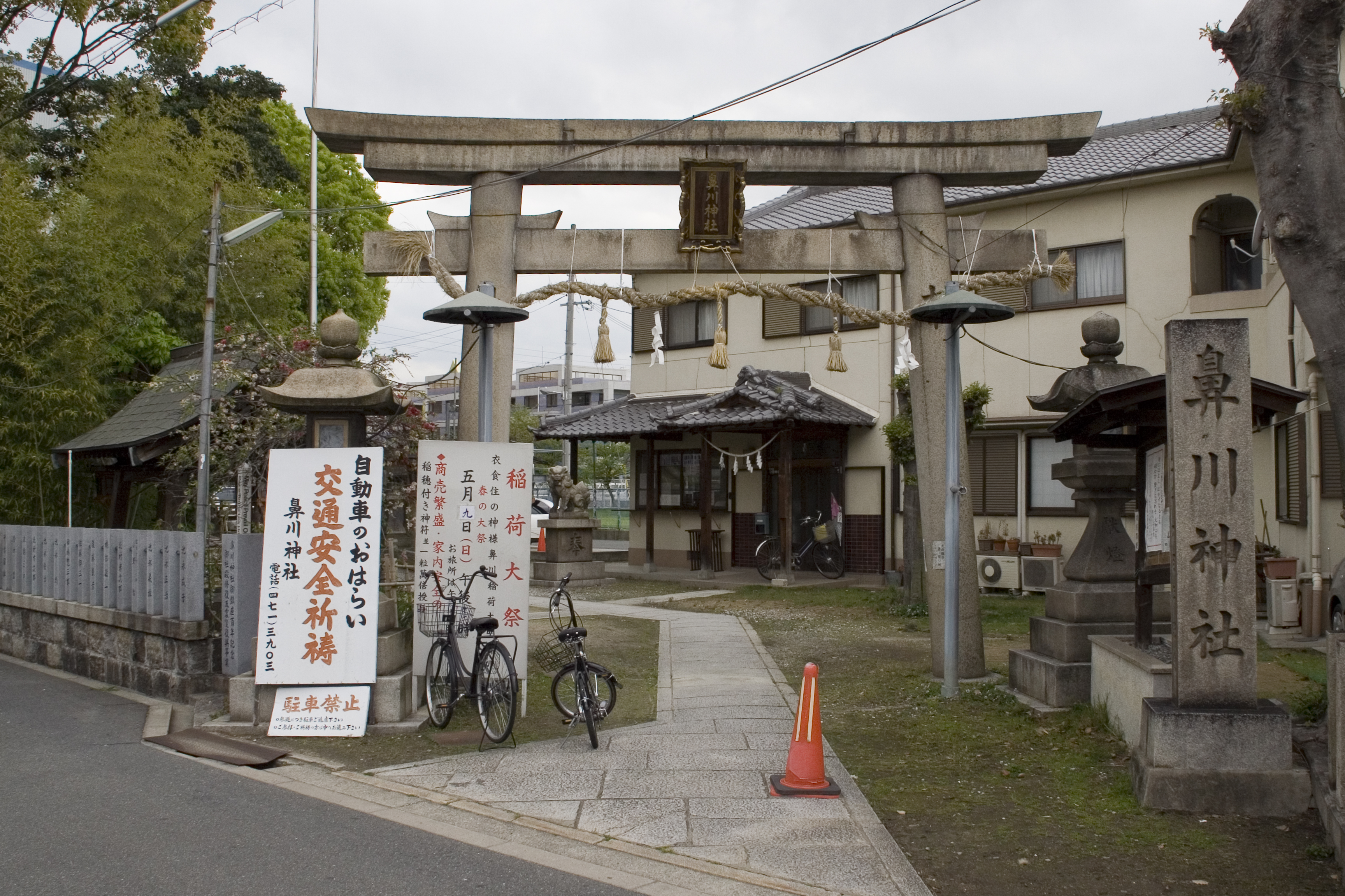 =鼻川神社（大阪市西淀川区）